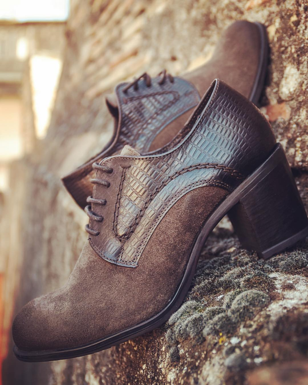 Zapatos tejado